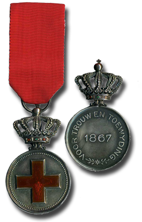 Regeringsmedaille Rode Kruis 1910